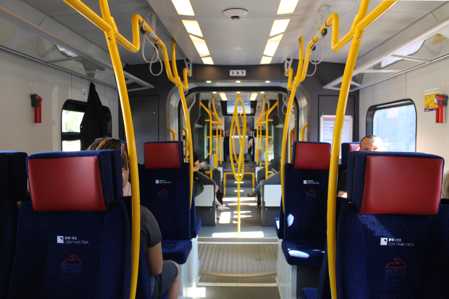 Wnętrze elektrycznego zespołu trakcyjnego EN100-01.